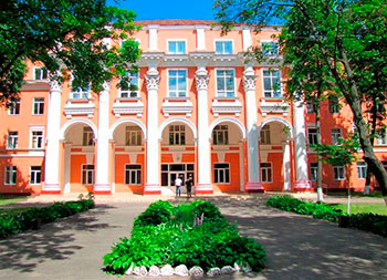 2 корпус ГГУ